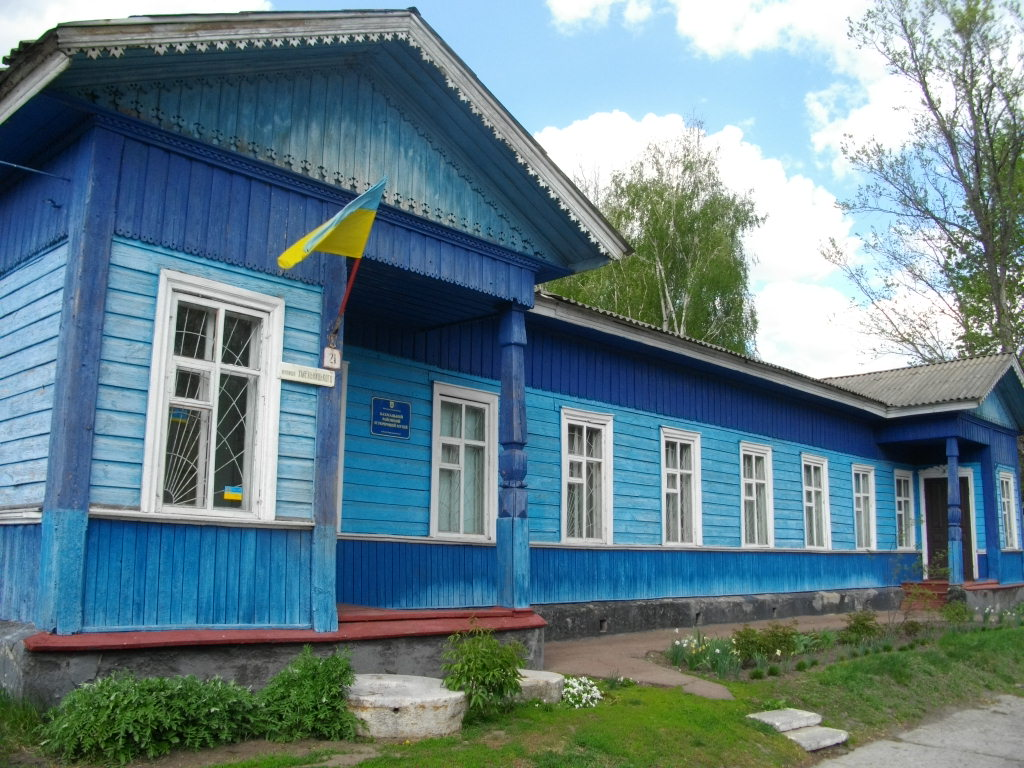 Фото було зроблено у місті Бахмачі на відпочинку у бабусі. На фототографії Бахмацький районний історичний музей.